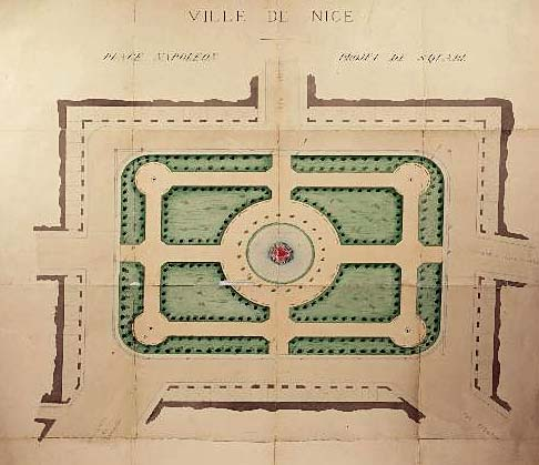 Projet municipal d'un square arboré, en 1868, sur la place Garibaldi à Nice.